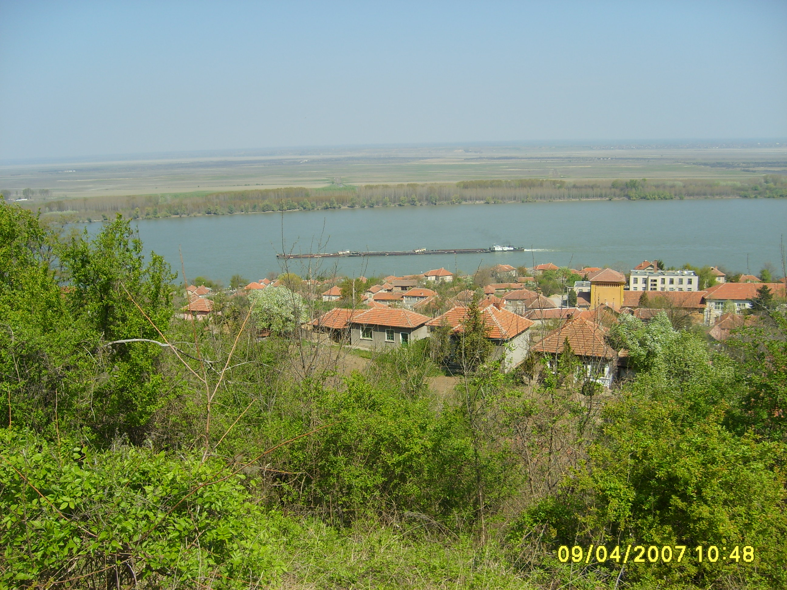 Изглед към Горни Вадин